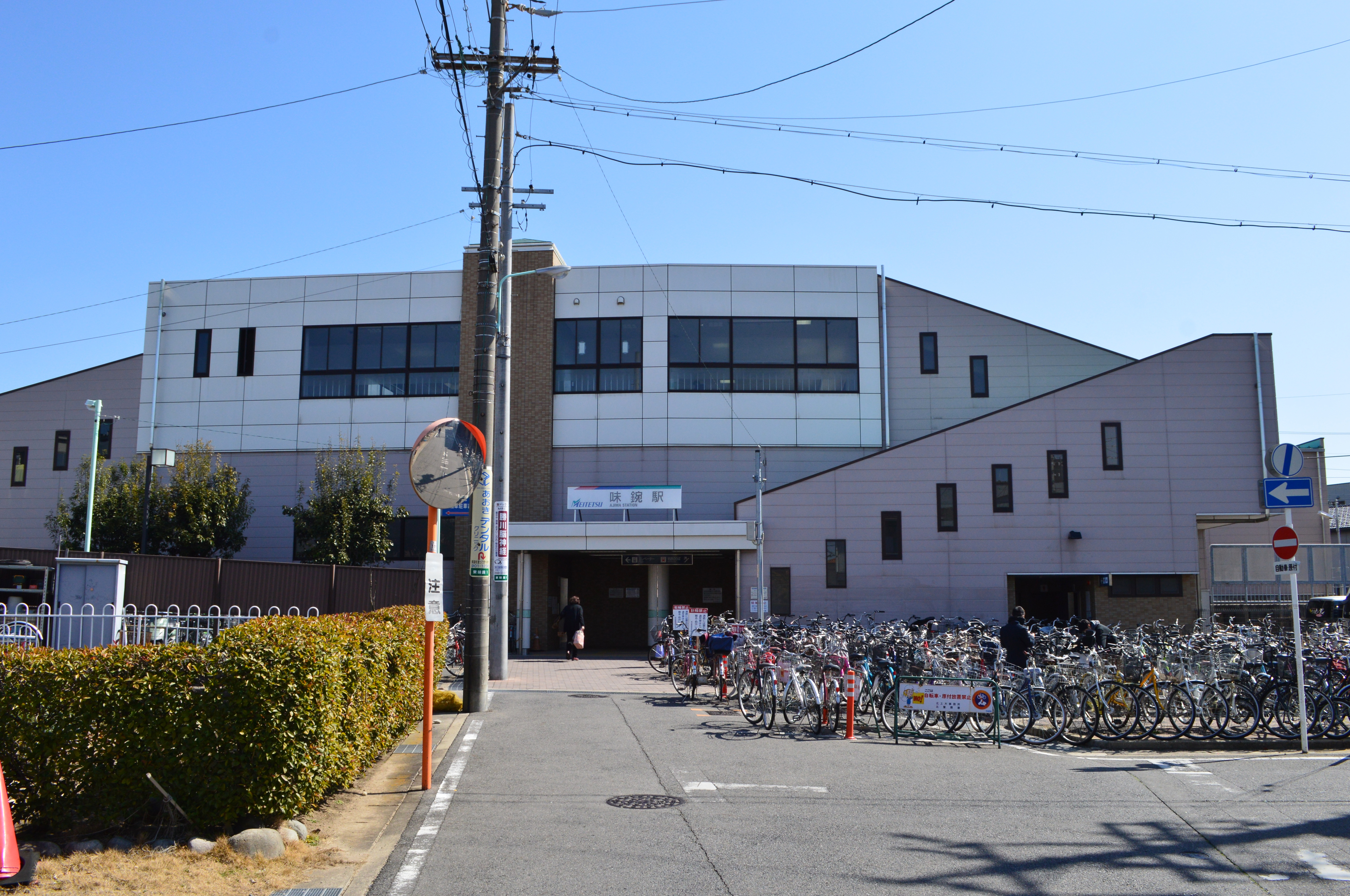 味鋺駅 駅舎